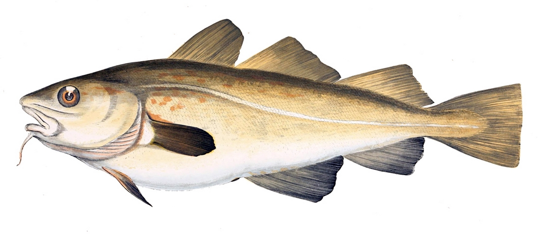 Dessin d'une morue de l'Atlantique